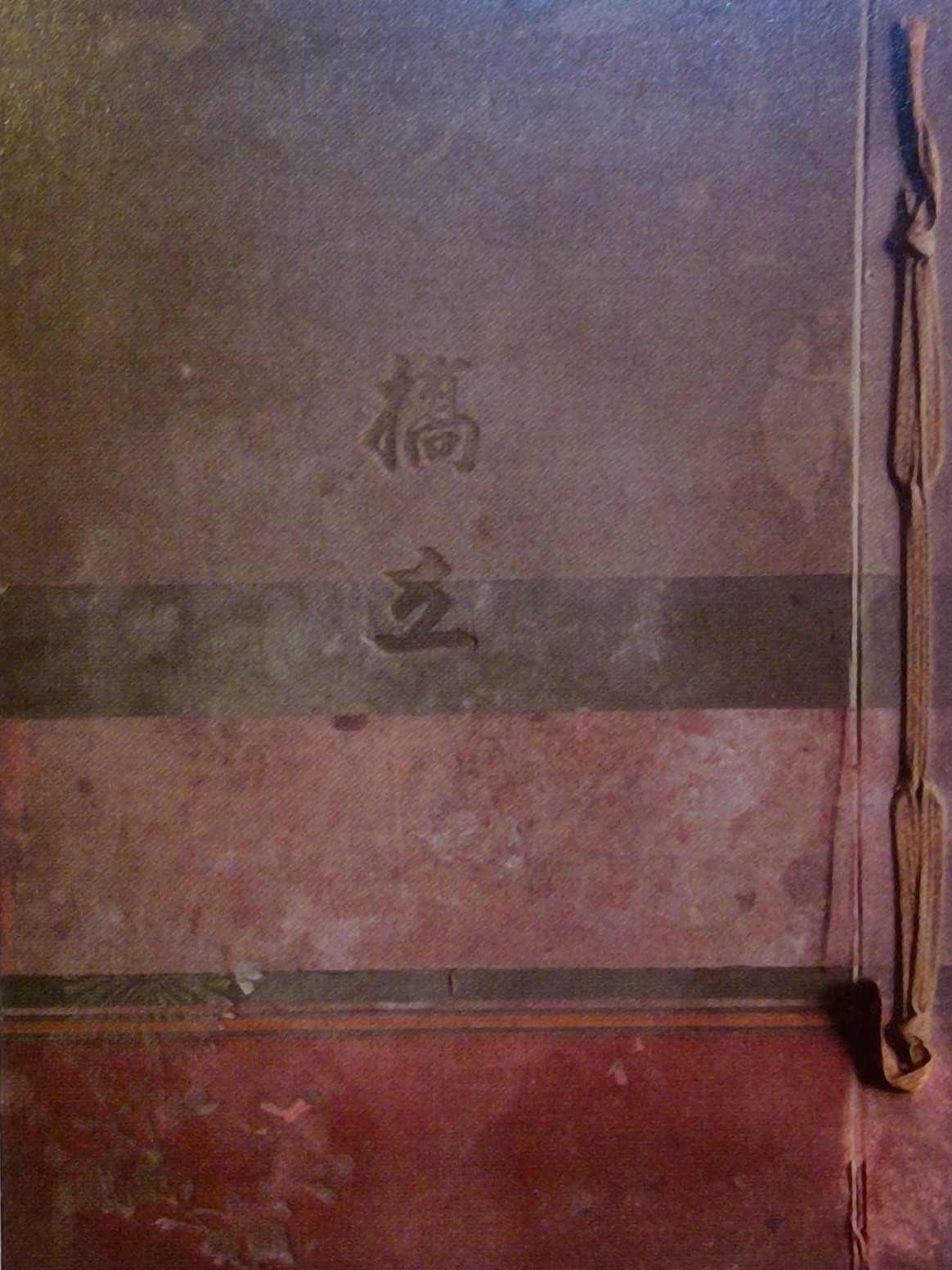 明治末期から大正初期にかけて織られた丹後ちりめんの織物見本帳の表紙。日本遺産・丹後ちりめん回廊の構成文化財の一つ。